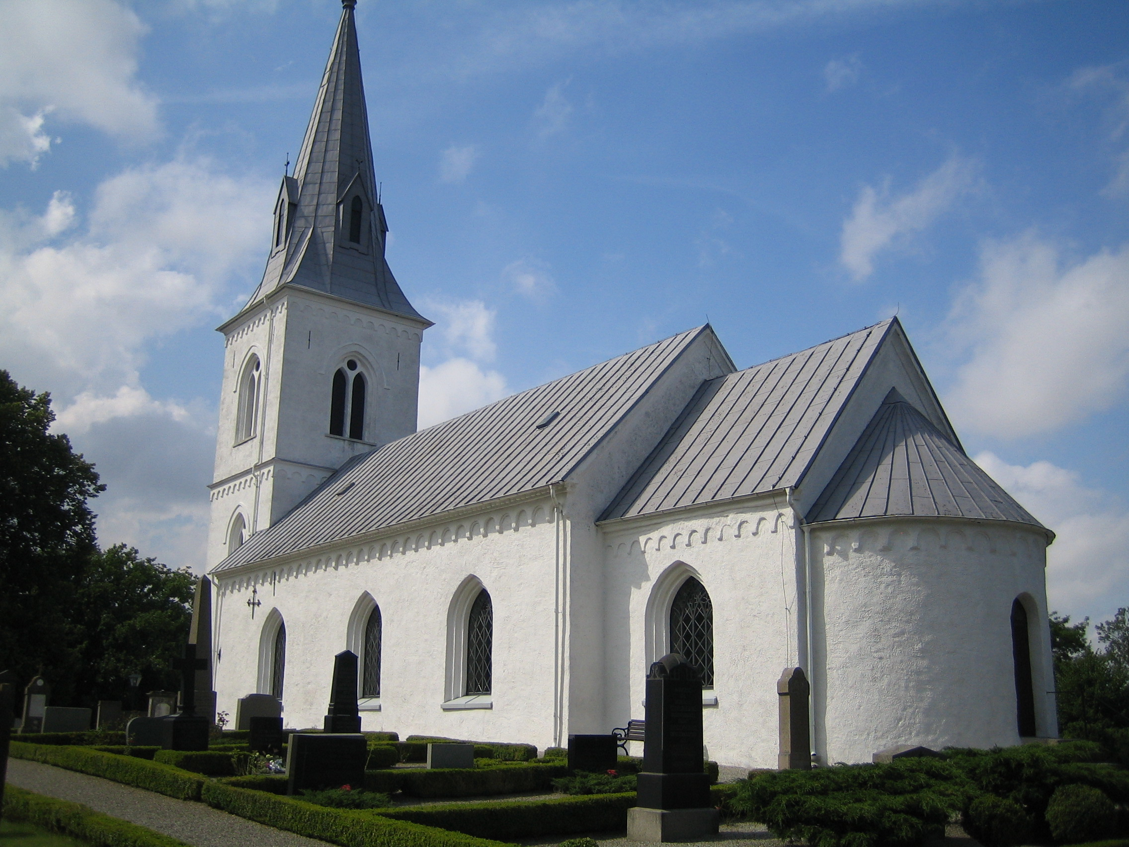 Stora Slågarps kyrka.